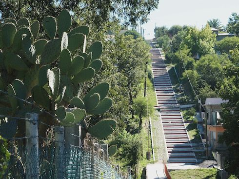 Escalera al cielo ( de plaza central al panteón ) - Iturbide, Nuevo León, México